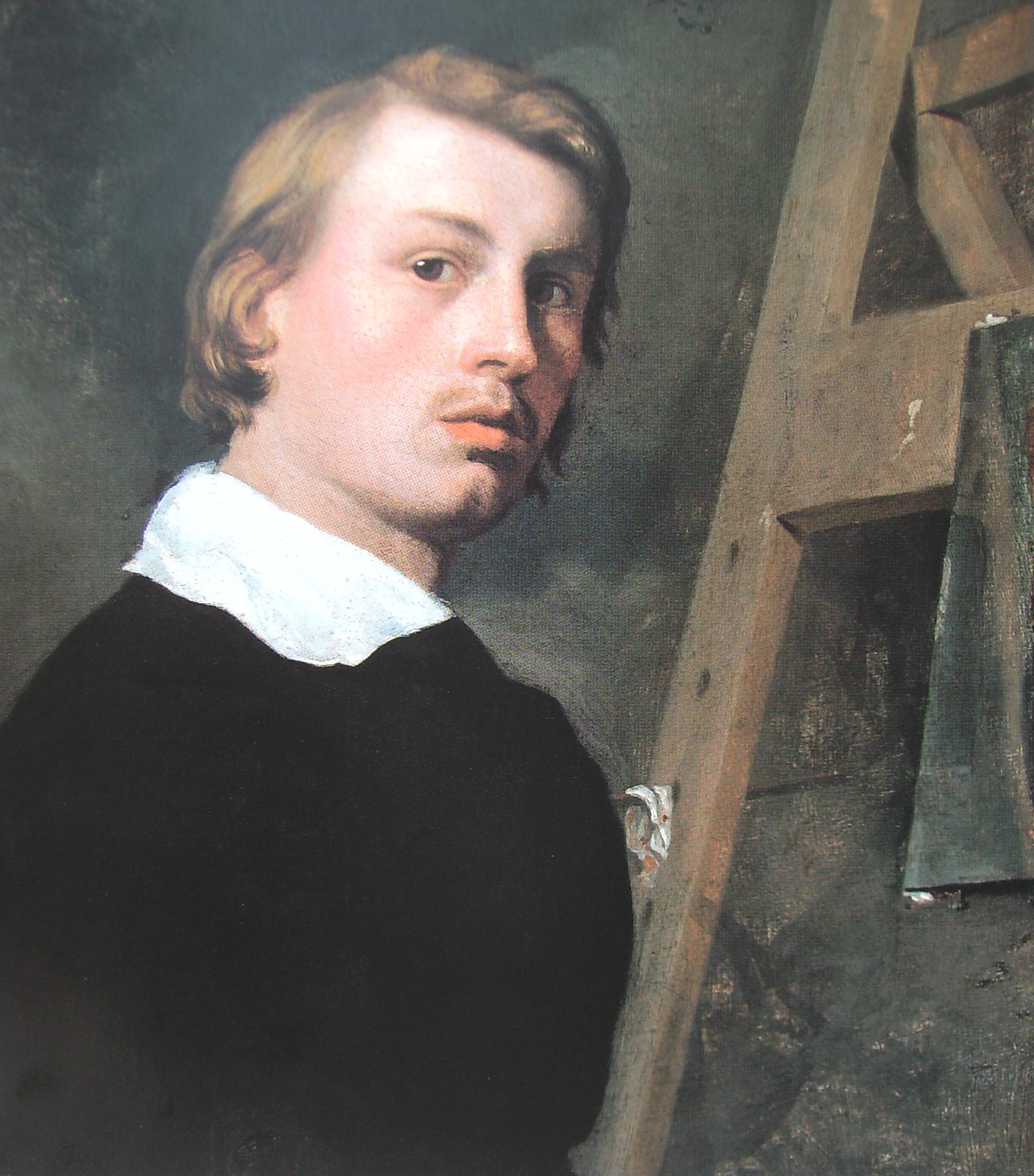 Louis Krevel: Selbstportrait (um 1820)